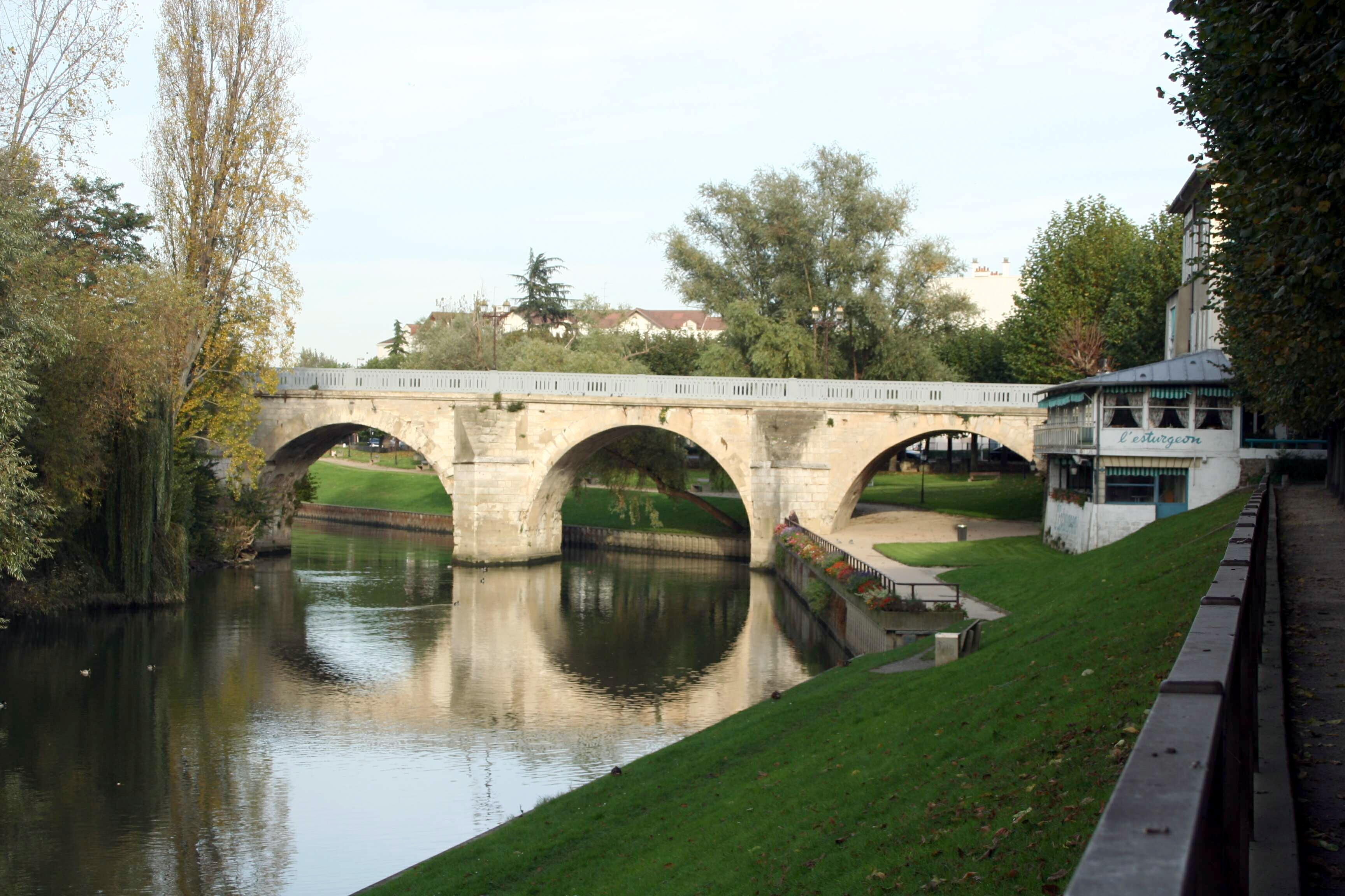 Ancien pont - Yvelines (France)